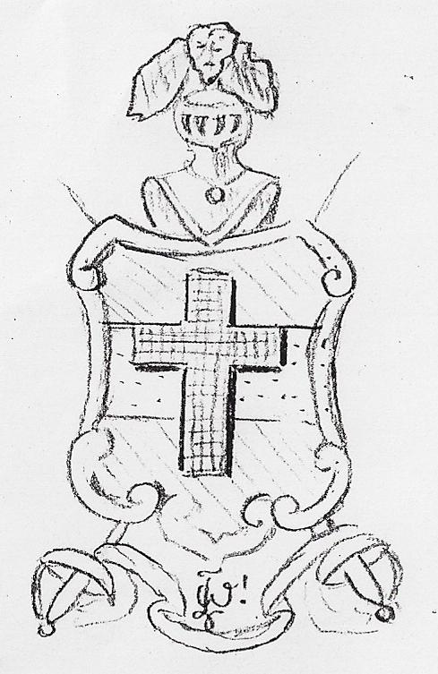 Zeichnung des Wappens der Wirttembergia Leipzig von 1856 Farben (von oben nach unten): grün-gold-grün mit schwarzem Kreuz